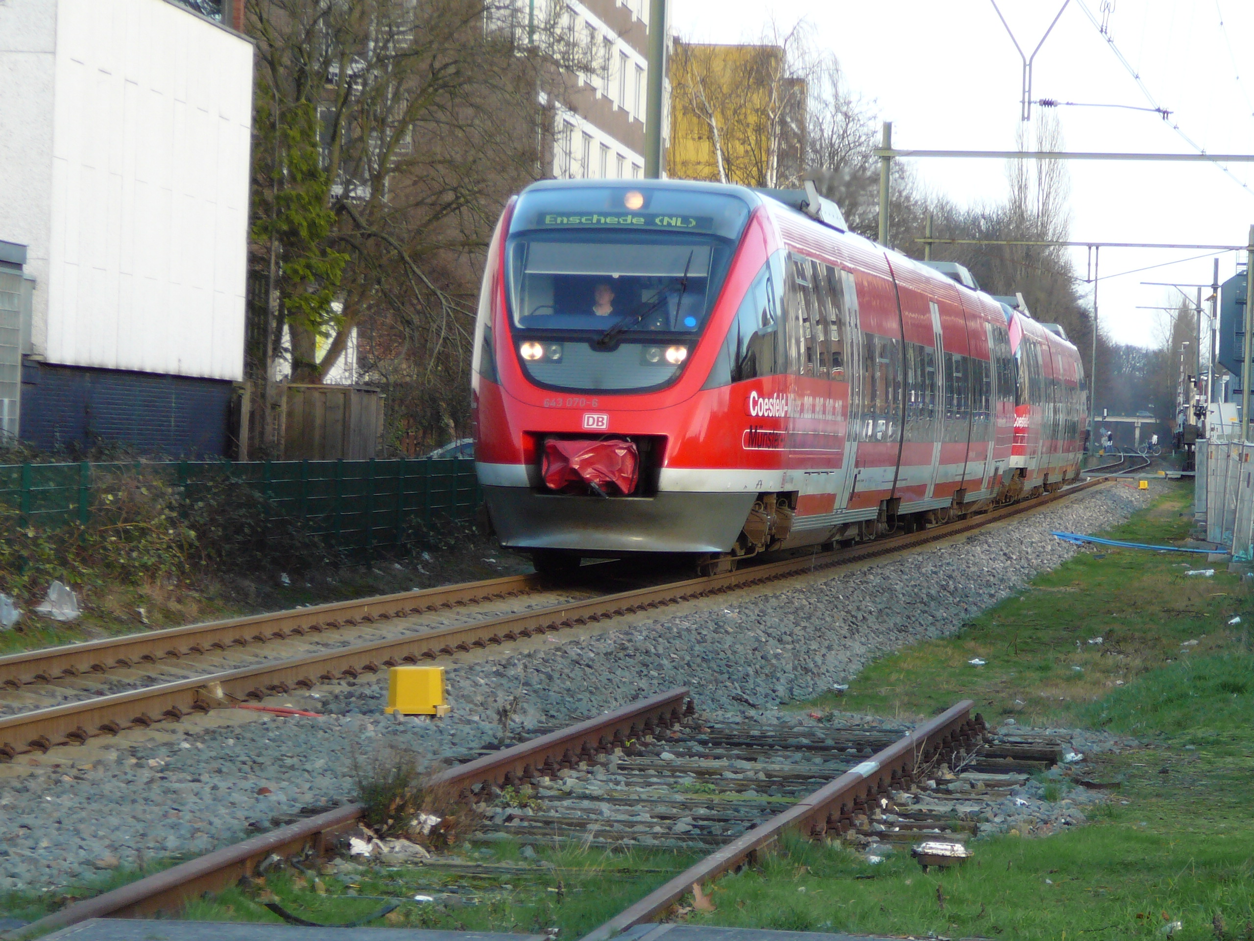 643 070 6 Munster (Westf.) Hbf - Enschede, Enschede, 03.02.2007